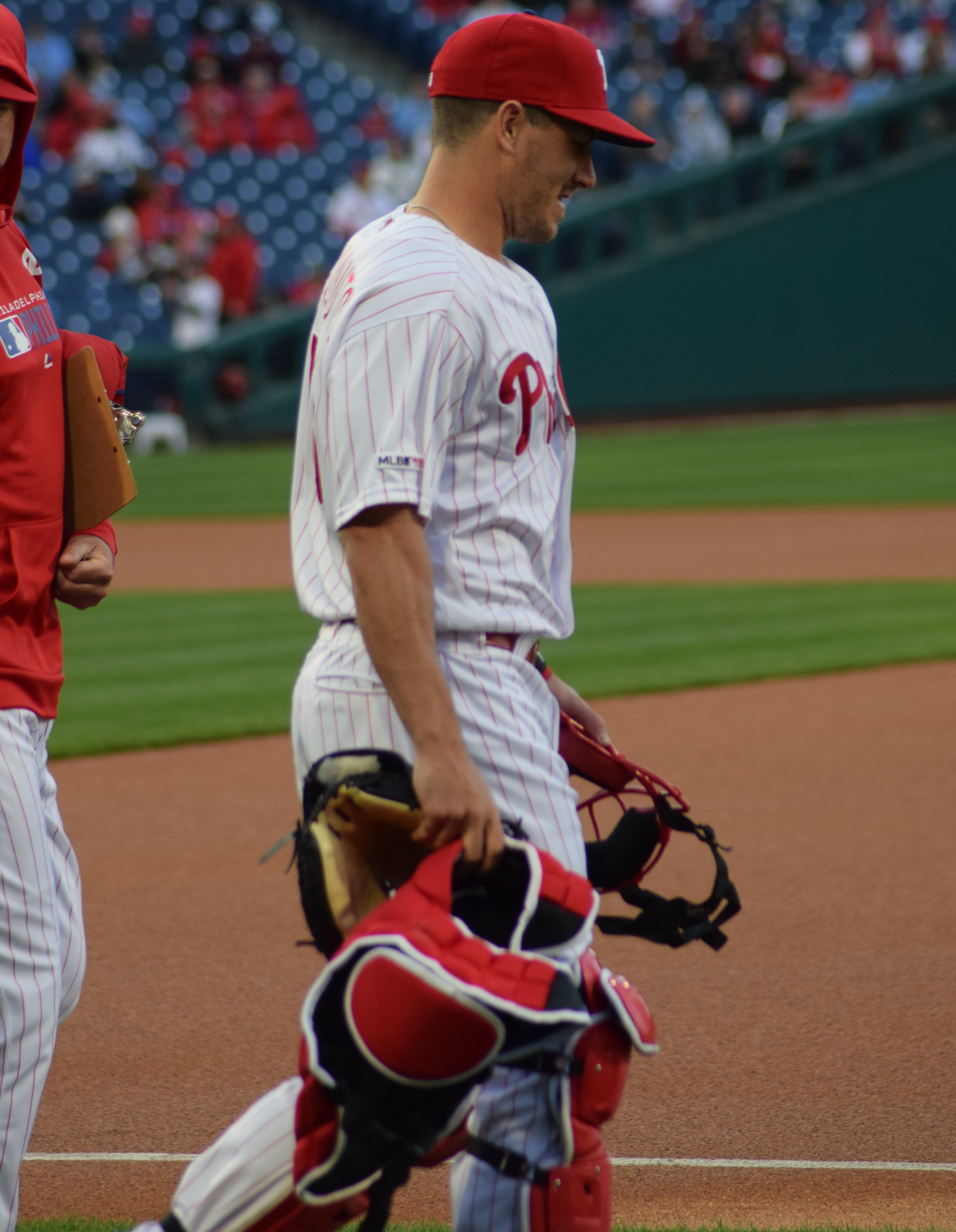 J.T. Realmuto